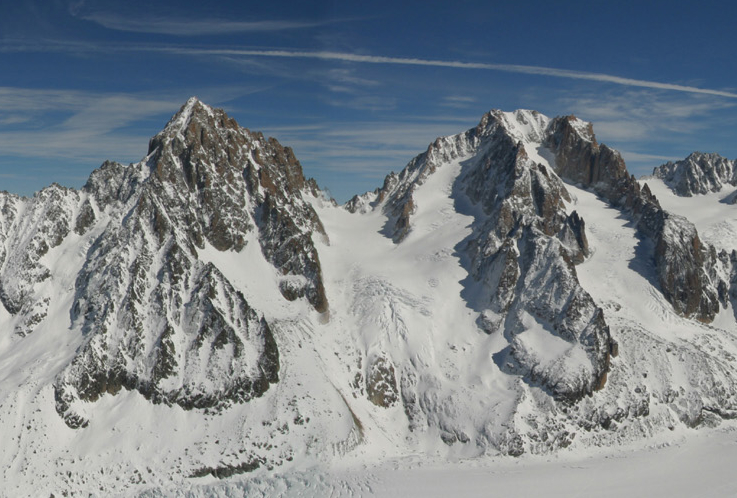 Aiguille du Chardonnet (links) und Aiguille d'Argentiere